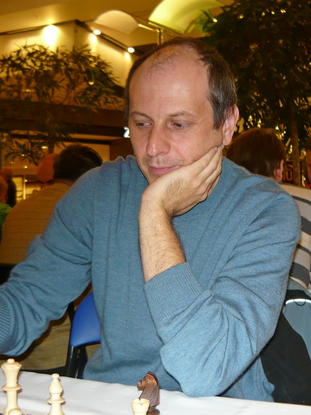 GM Paweł Jaracz, Mistrzostwa Polski w Szachach Błyskawicznych, Bydgoszcz 2014.